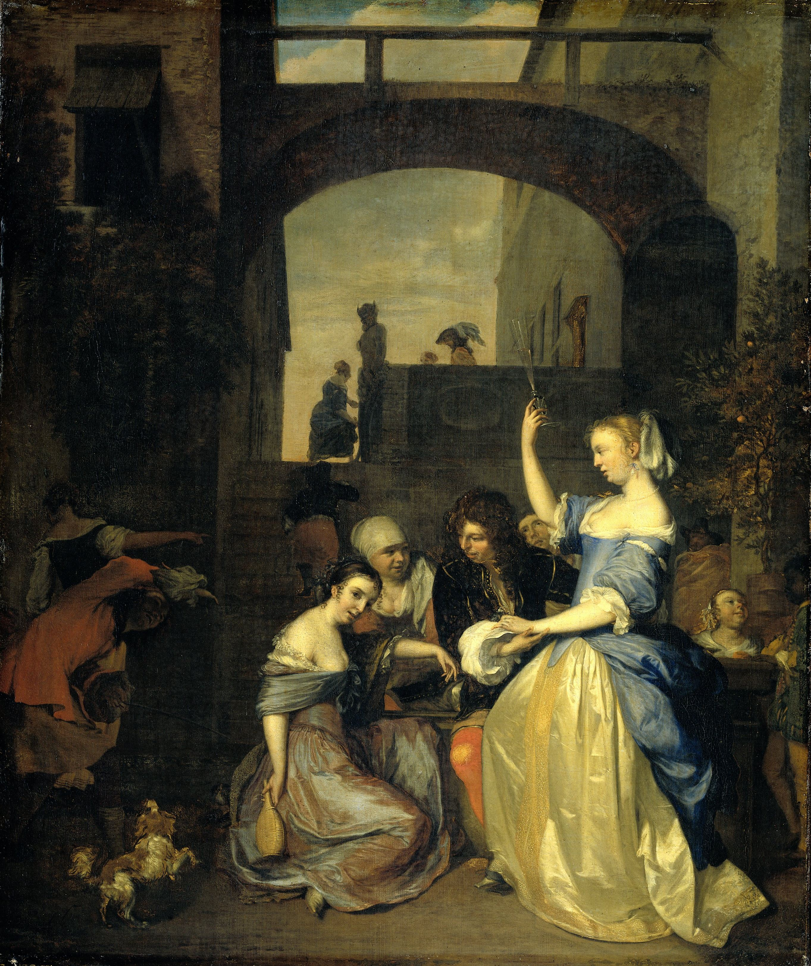 De verloren zoon vermaakt zich tussen vrouwen in een herberg.. Op de binnenplaats van een herberg zit de verloren zoon omringd door drie vrouwen, de vrouw rechts heft een wijnglas in de lucht. Links speelt een man met twee hondjes.